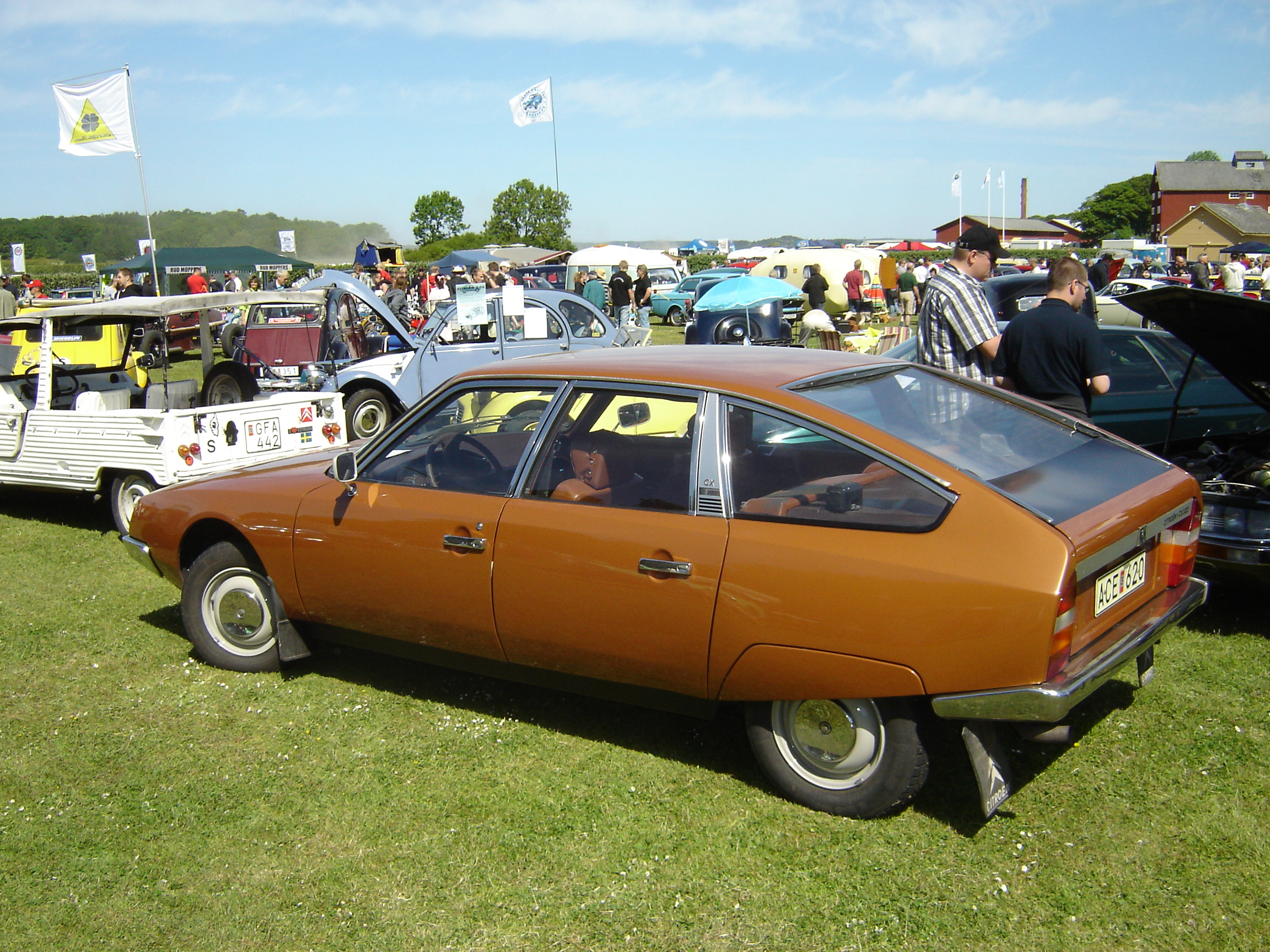 1975 Citroen CX